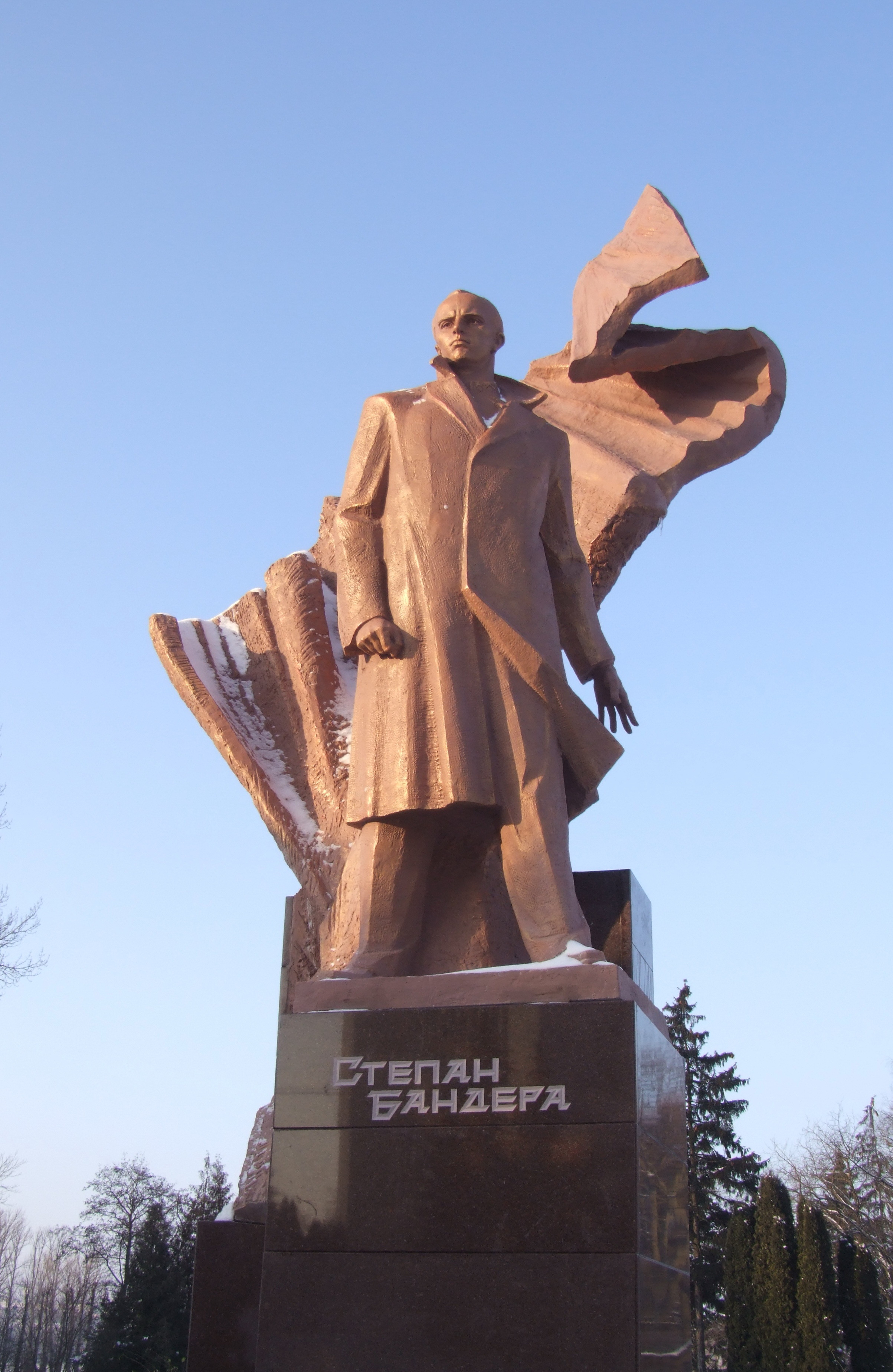 Пам'ятник провіднику Організації Українських Націоналістів Бандері Степану Андрійовичу, Тернопіль, вул. С. Крушельницької, парк імені Тараса Шевченка, біля обласної державної адміністрації